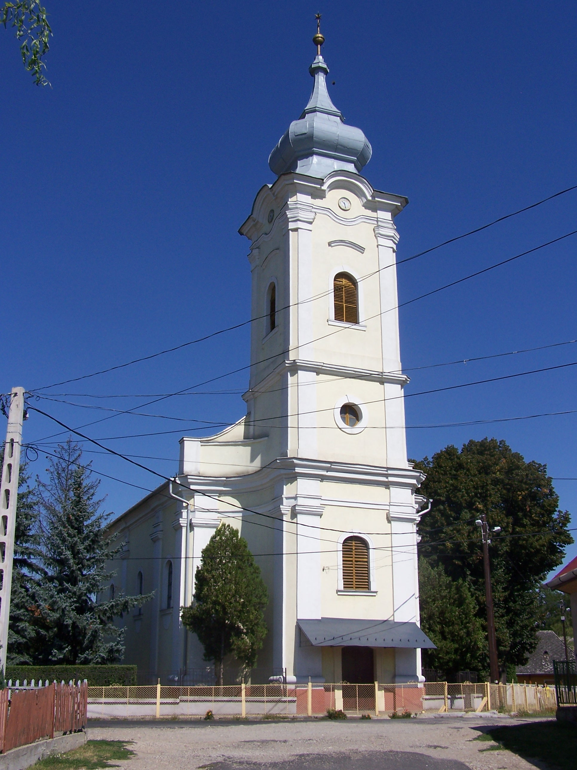 Református templom (Alsózsolca, Kossuth u.) This is a photo of a monument in Hungary. Identifier: 2649